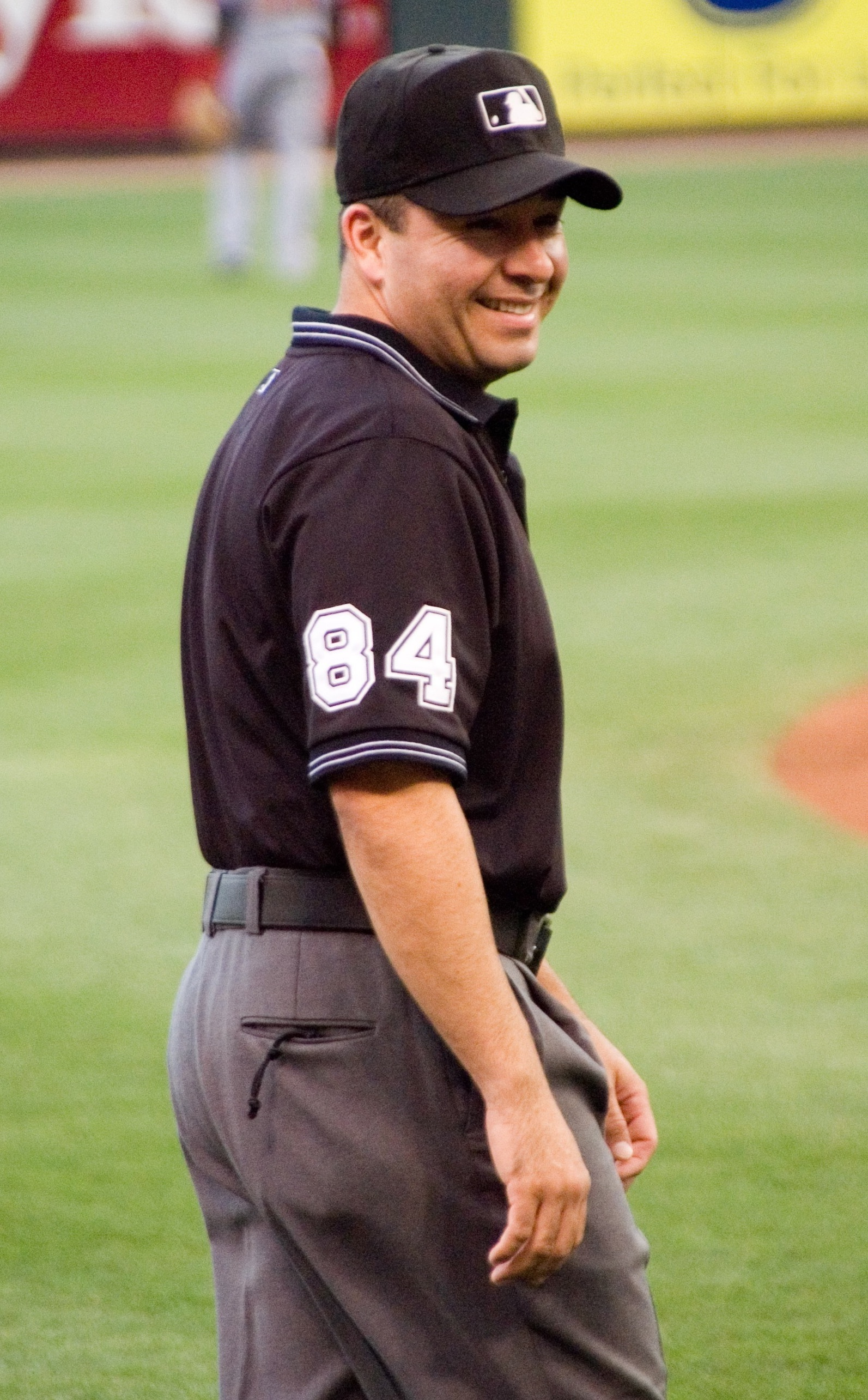 Umpire Angel Campos